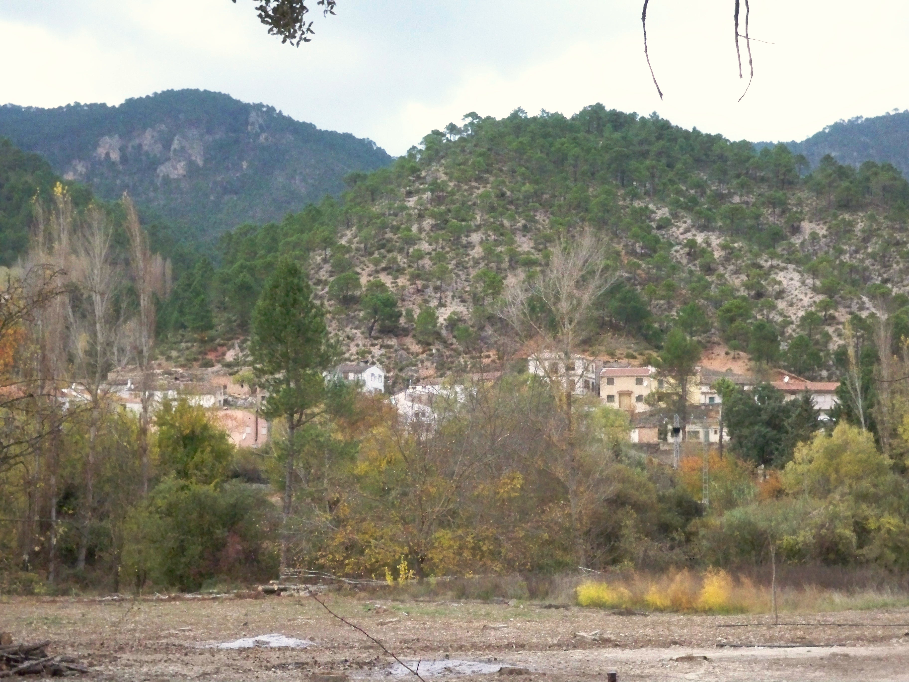 Vista de la localidad de Mesones, en el municipio español de Molinicos.